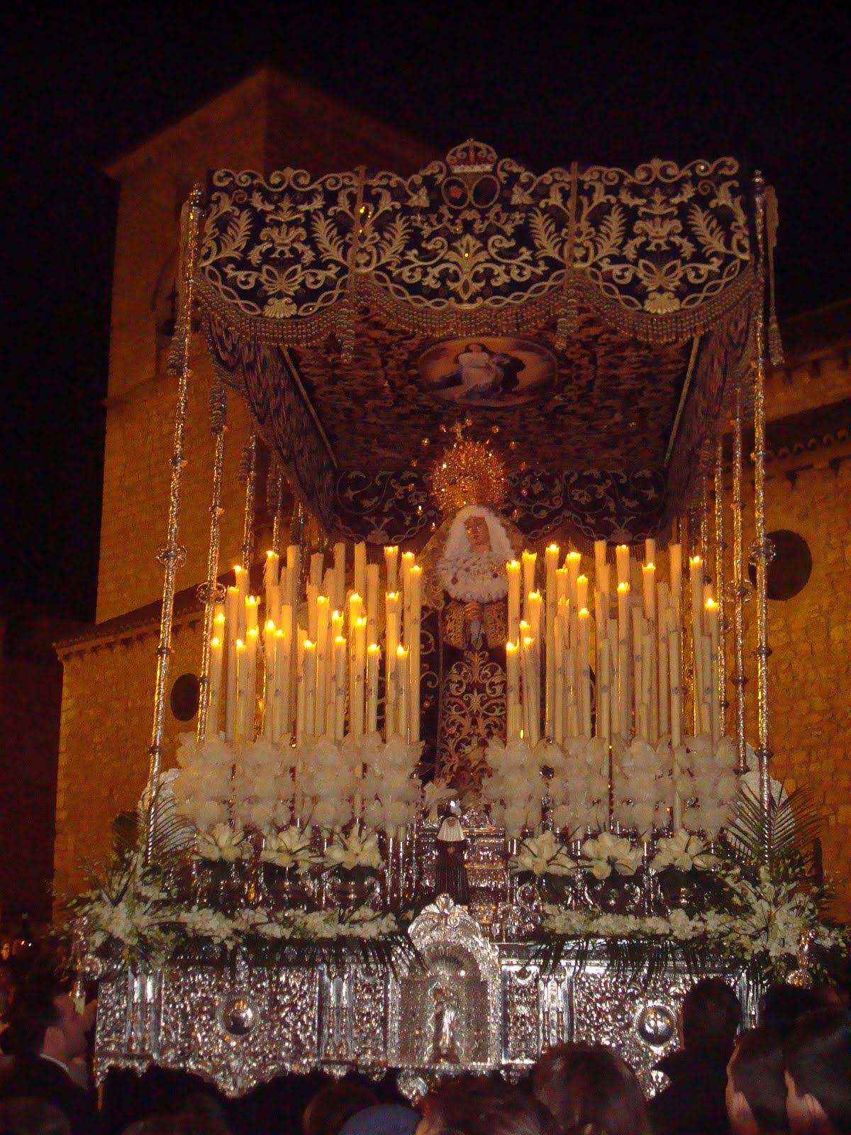 Perchelera